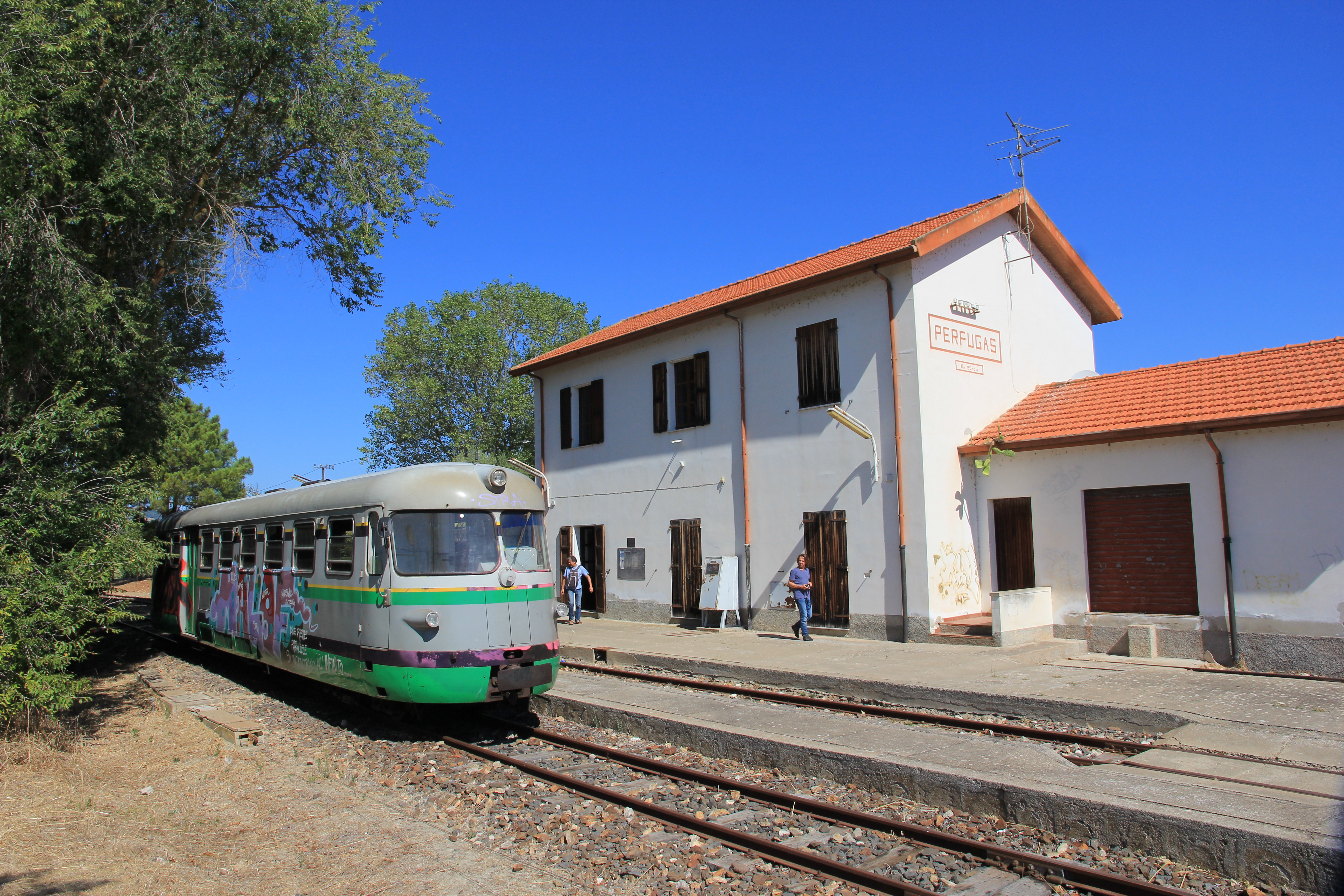 Perfugas - Stazione ferroviaria